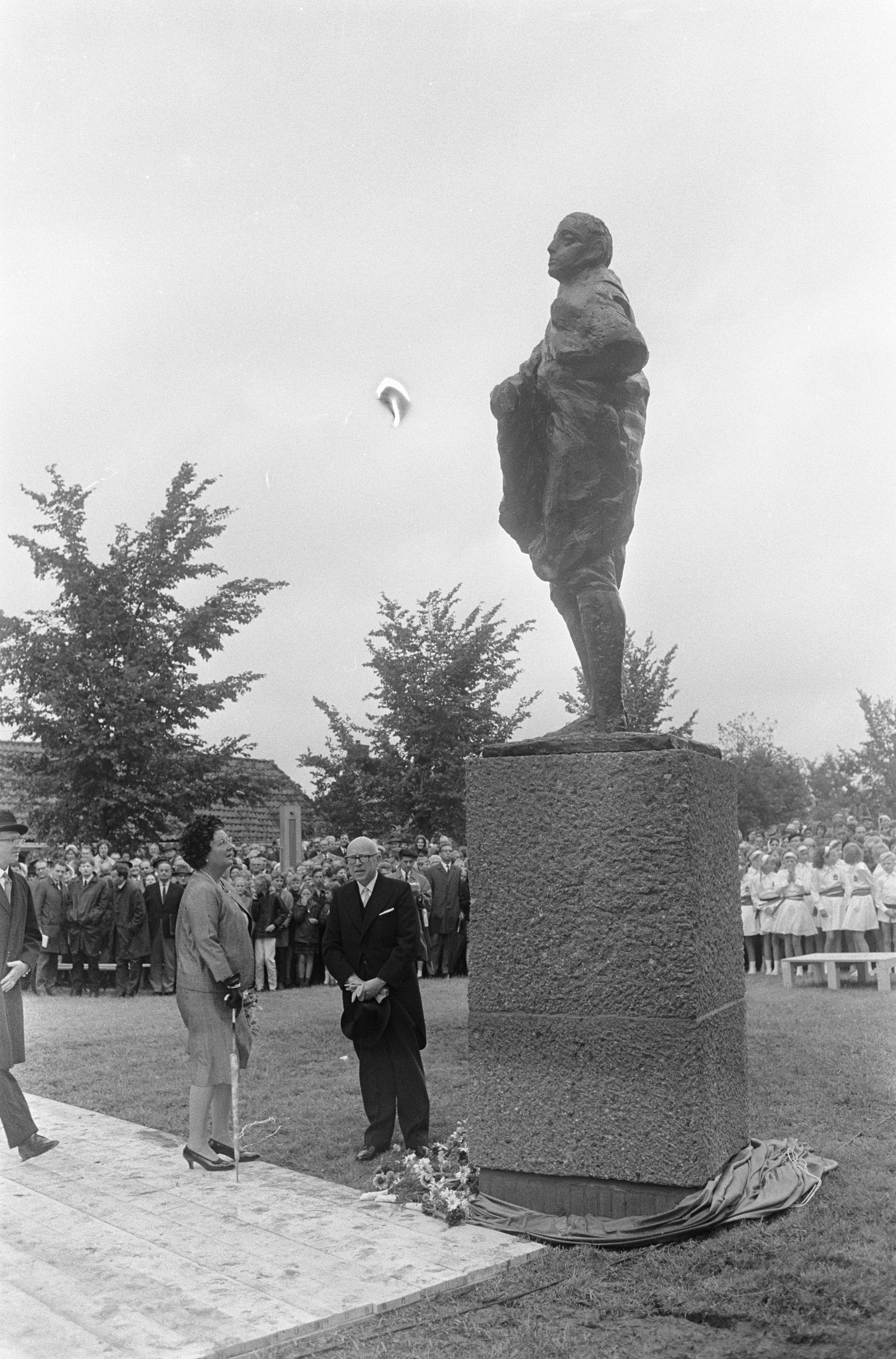 Collectie / Archief : Fotocollectie Anefo Reportage / Serie : Koningin Juliana is in Bolsward Beschrijving : Koningin Juliana onthult een standbeeld ter nagedachtenis aan de Friese dichter Gijsbert Japicx, rechts naast de koningin de heer A. Holkema Datum : 27 juni 1966 Locatie : Bolsward, Friesland Trefwoorden : STANDBEELDEN, dichters, koninginnen, onthullingen Persoonsnaam : Holkema, A., Juliana, koningin Fotograaf : Fotograaf Onbekend / Anefo Auteursrechthebbende : Nationaal Archief Materiaalsoort : Negatief (zwart/wit) Nummer archiefinventaris : bekijk toegang 2.24.01.05 Bestanddeelnummer : 919-2933